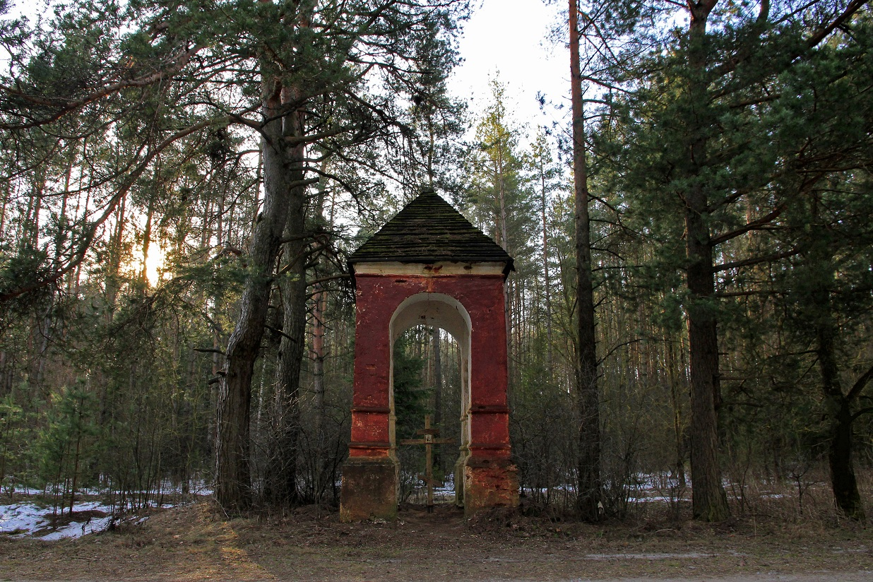 Пярэжары. Прыдарожная капліца